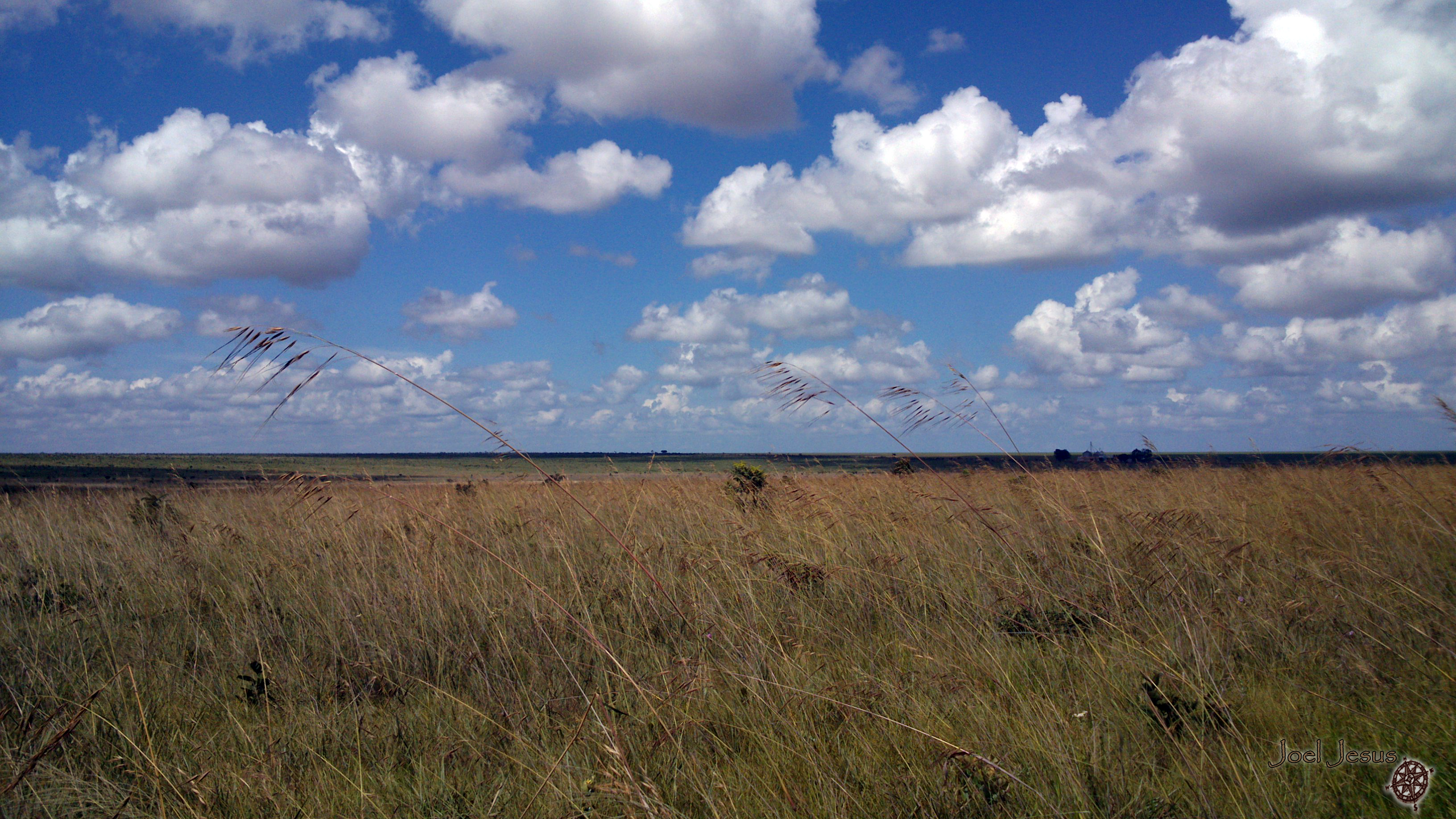 Umas das fitofisionomias protegidas na maior reserva de cerrado do Brasil